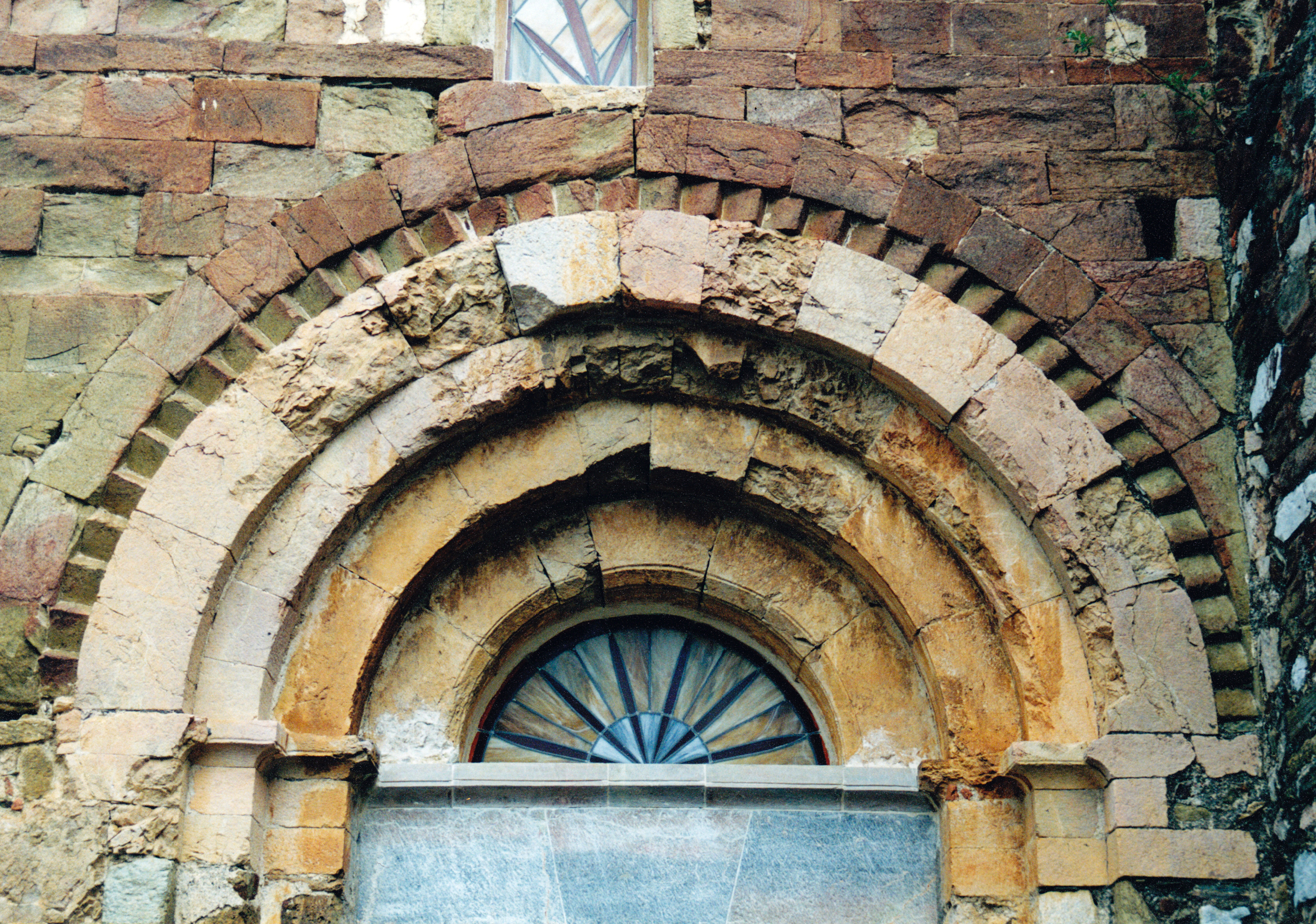 France - Pyrénées-Orientales - Aspres - Église Saint-Félix de Calmeilles